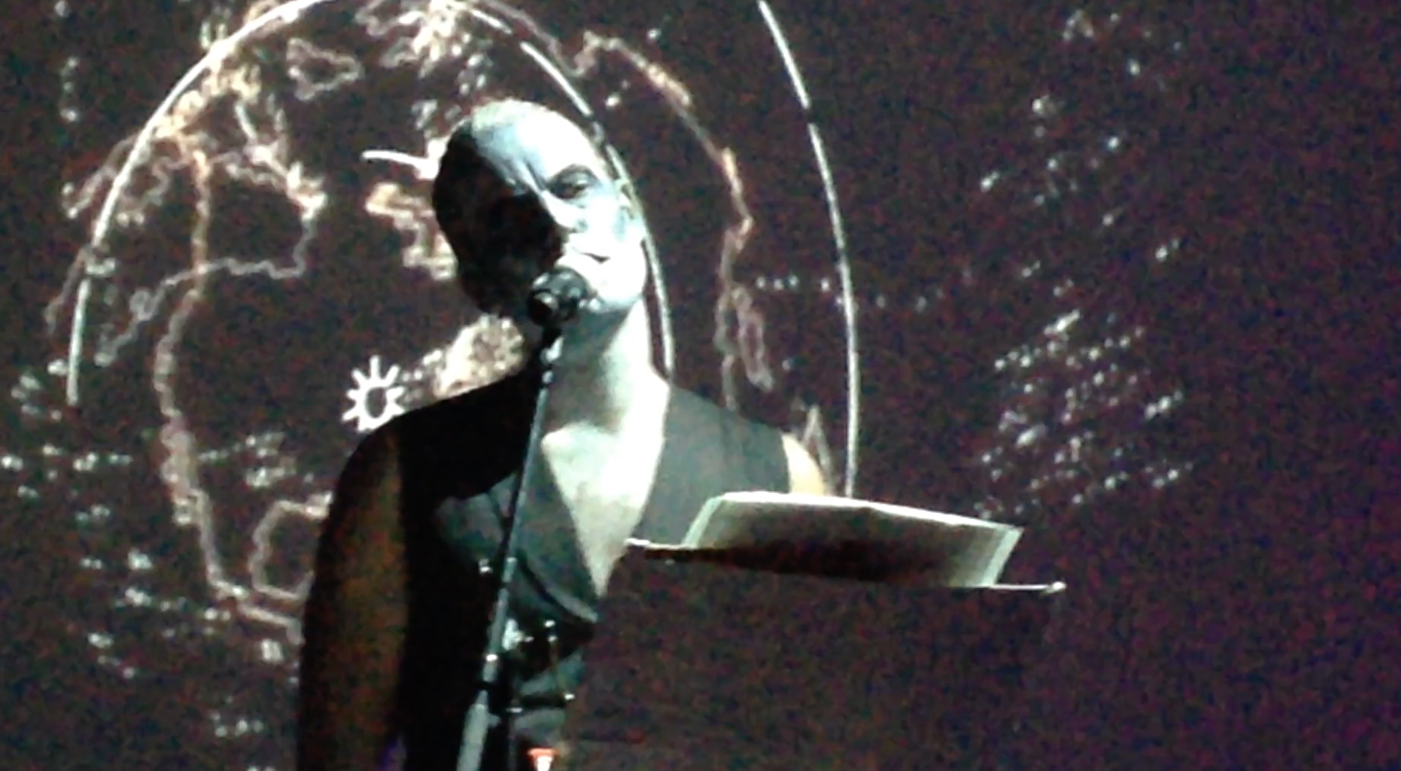 Concert 062014